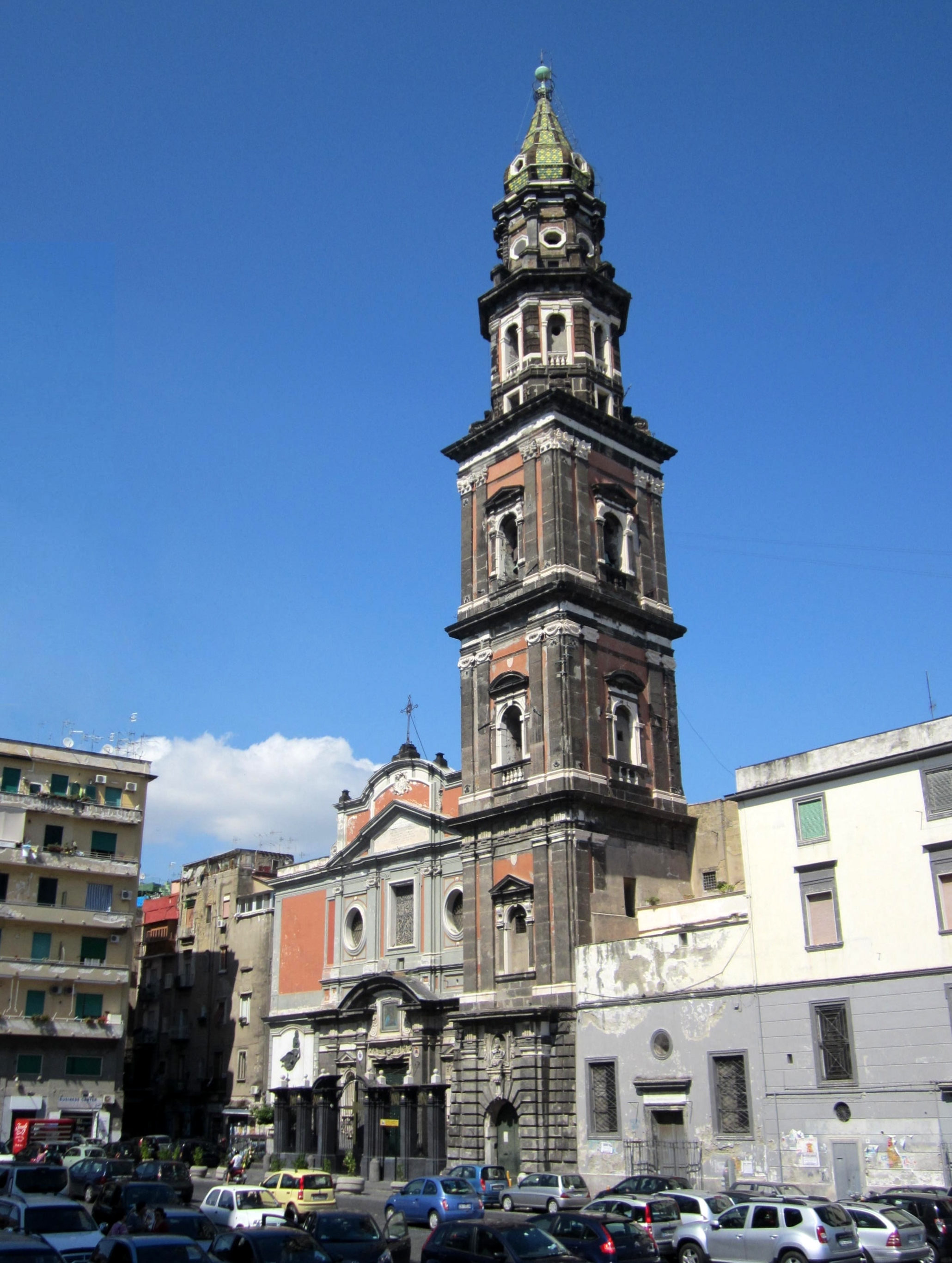 Basilica Santuario di Santa Maria del Carmine Maggiore a Napoli